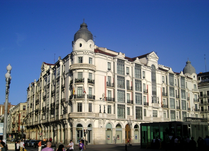 Casa Mantilla, paradigma de la vivienda burguesa en Valladolid, desde la plaza de Zorrilla. En el bajo, una sucursal del Banco Bilbao Vizcaya Argentaria. Valladolid, España.